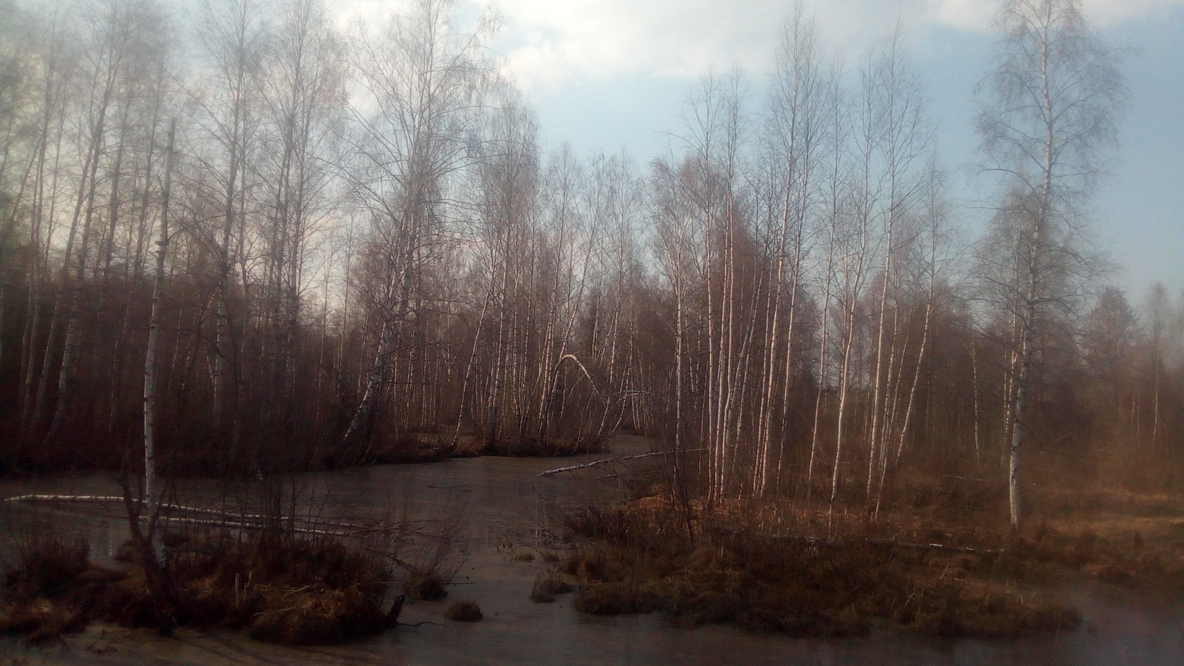 Апрель 2019.